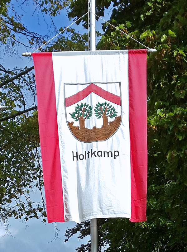 Banner mit dem Wappen der ehemaligen Gemeinde Holtkamp, aufgestellt an der Evangelischen Kirche Isselhorst.